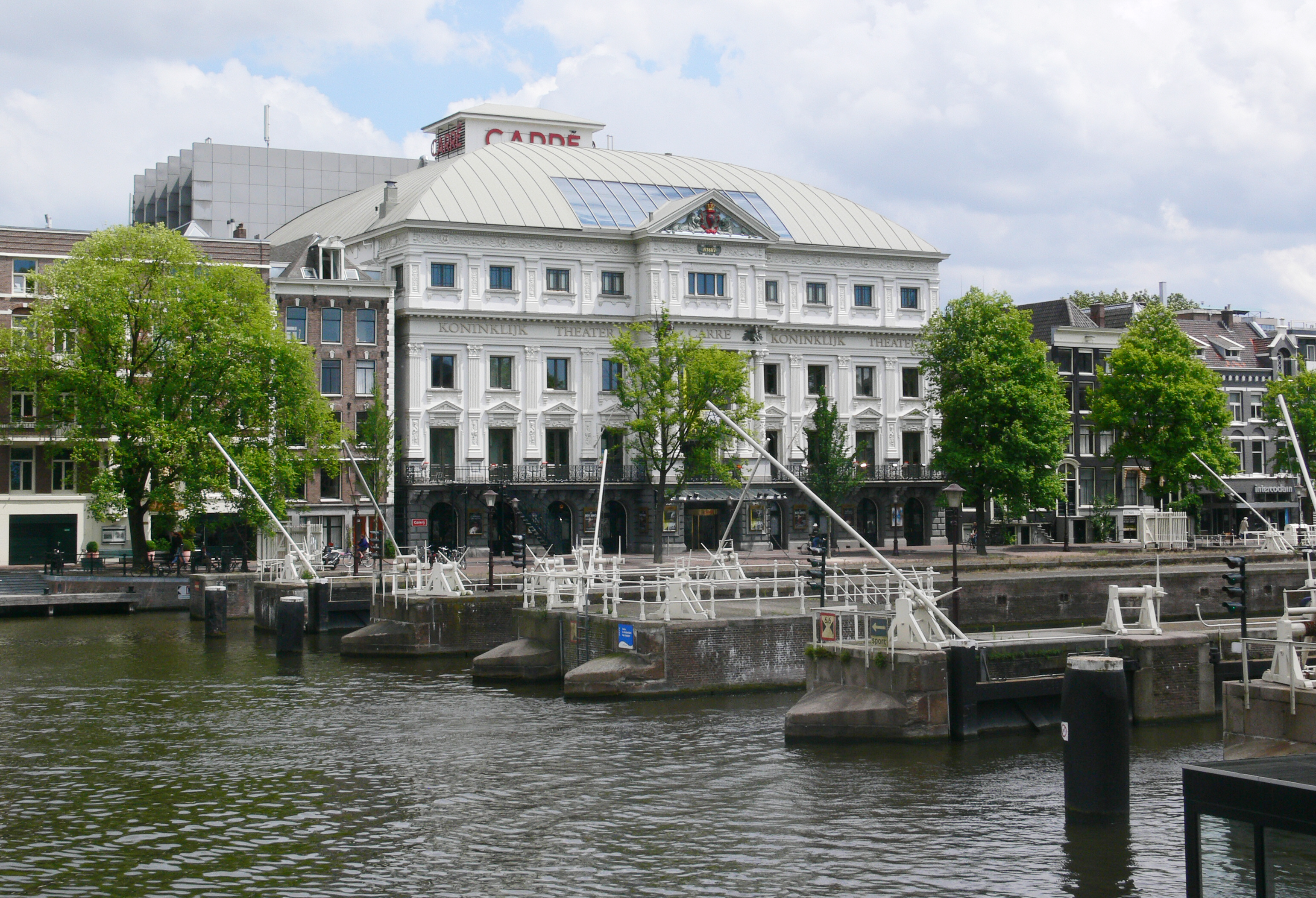 Koninklijk Theater Carré, Amsterdam. Op de voorgrond de monumentale Amstelsluizen.